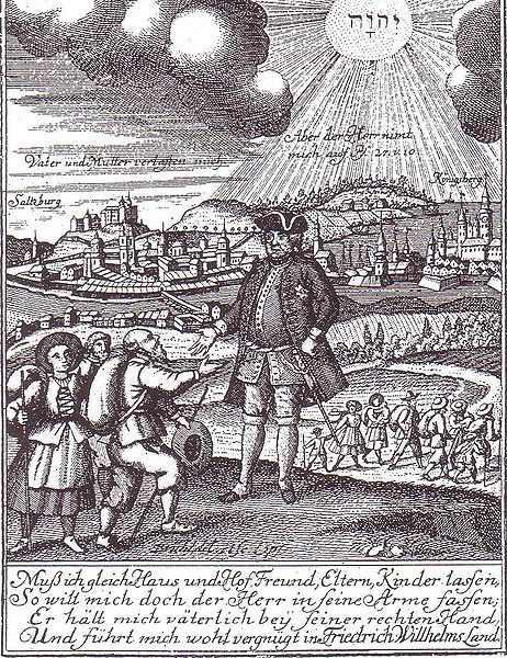 Król Prus Fryderyk Wilhelm I wita w Prusach protestanckich uchodźców z Salzburga (rycina z 1742 roku)